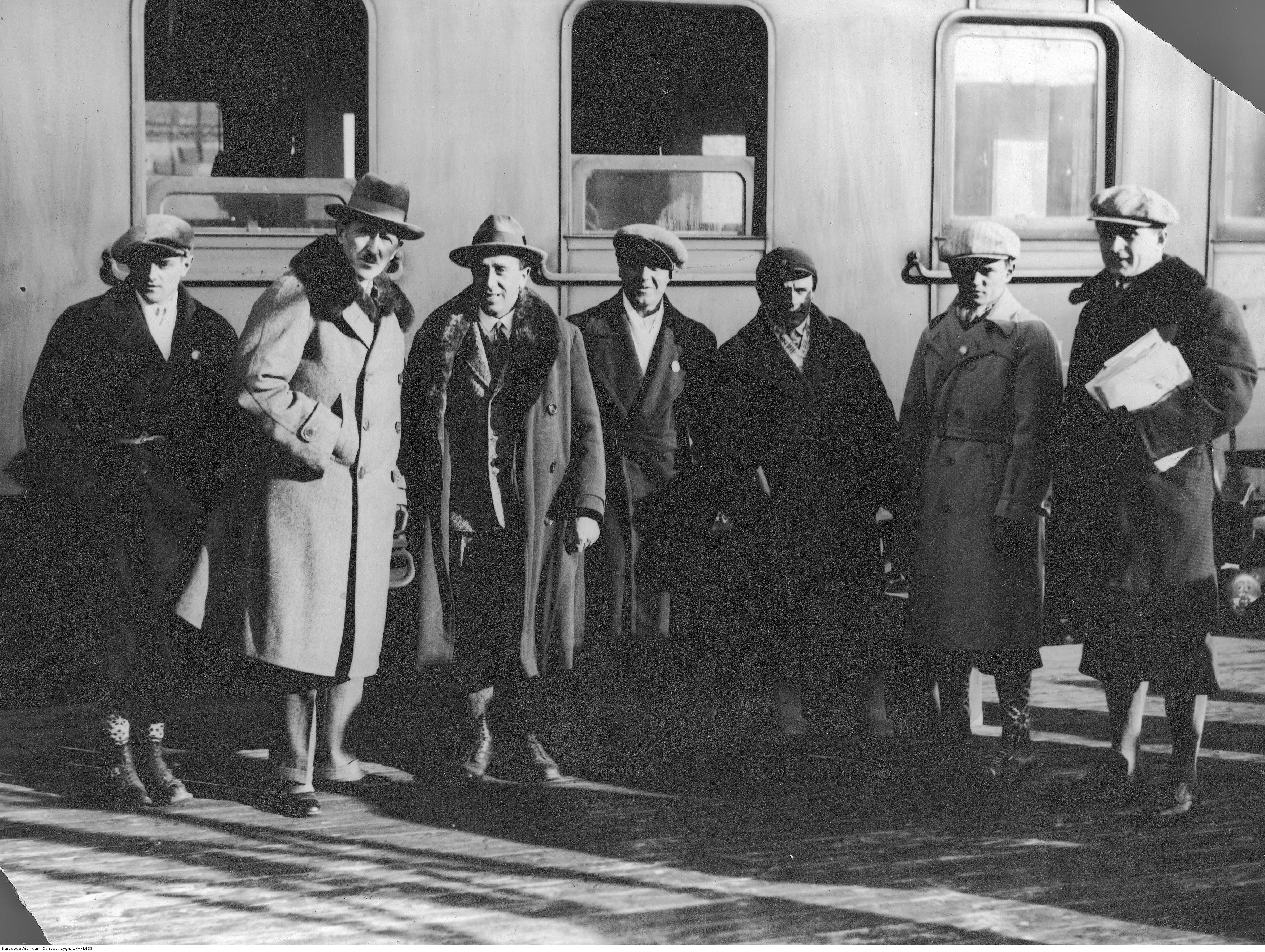 Przyjazd polskiej ekipy na Mistrzostwa Świata w Narciarstwie Klasycznym FIS w Oslo. Polska ekipa: Karol Gąsienica-Szostak, płk. Aleksander Bobkowski, Stanisław Facher, Bronisław Czech i A. Szostak. 1930-02 (Koncern Ilustrowany Kurier Codzienny - Archiwum Ilustracji)